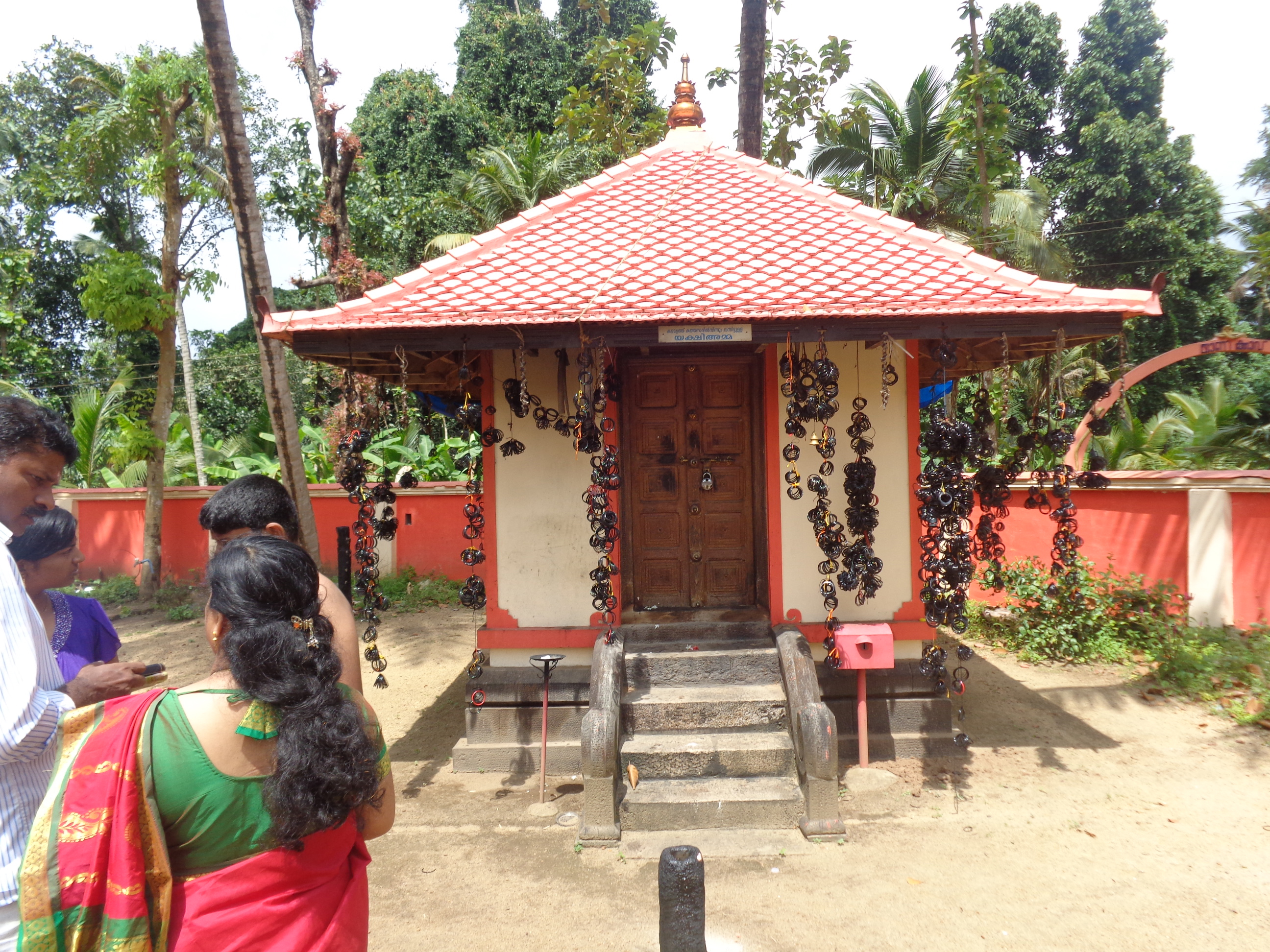 yakshi of panayanar kavu who merged to goddess of panayanar kavu, mannar, kerala